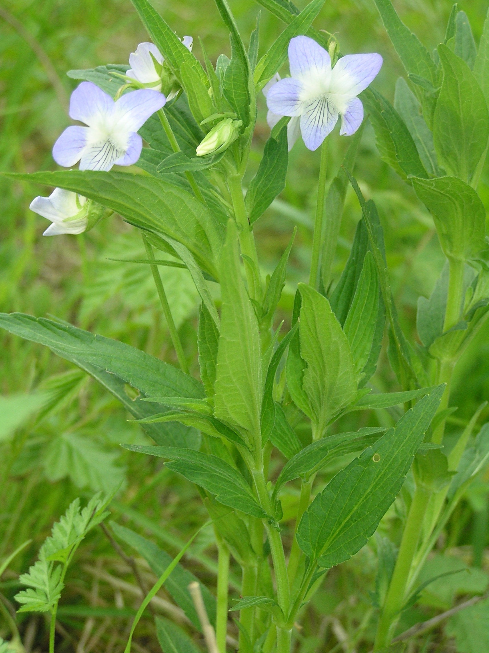 Viola elatior, Kančí obora near Břeclav, Czech Republic